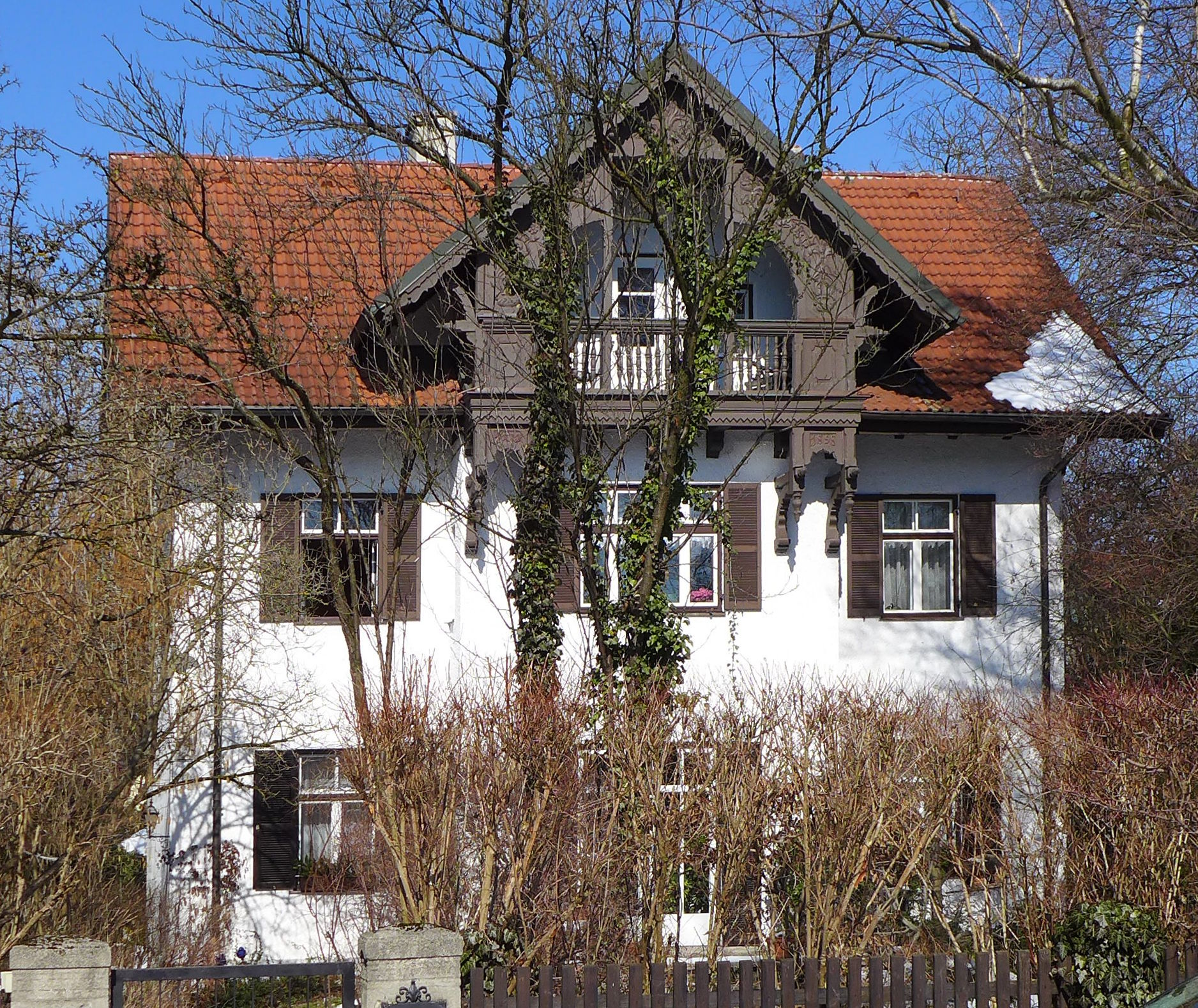 Lützowstr 28, München